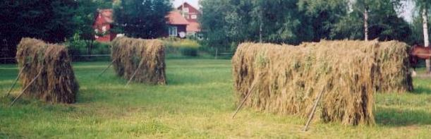 Hässjat hö, Persberg, Värmland (2003)